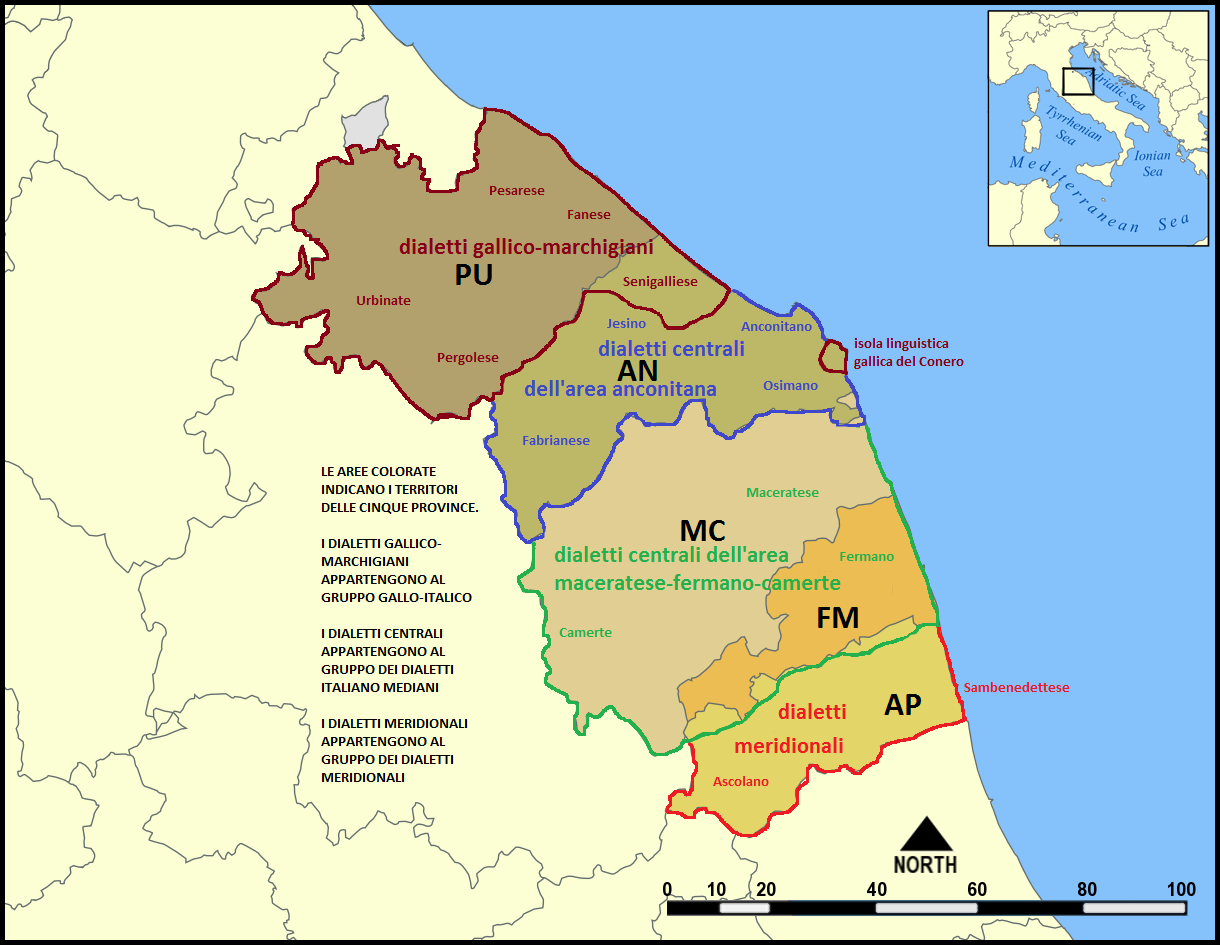 è la sovrapposizione sulla carta delle province delle Marche delle aree dialettali della regione. La base cartografica è tratta dal File:Marche Provinces.png, esistente su Wikimedia Commons. Le notizie sono tratte dalle fonti indicate nella voce "Dialetti marchigiani". Opera derivata dalle mappe di OpenStreetMap rilasciate con licenza CC-BY-SA-2.0